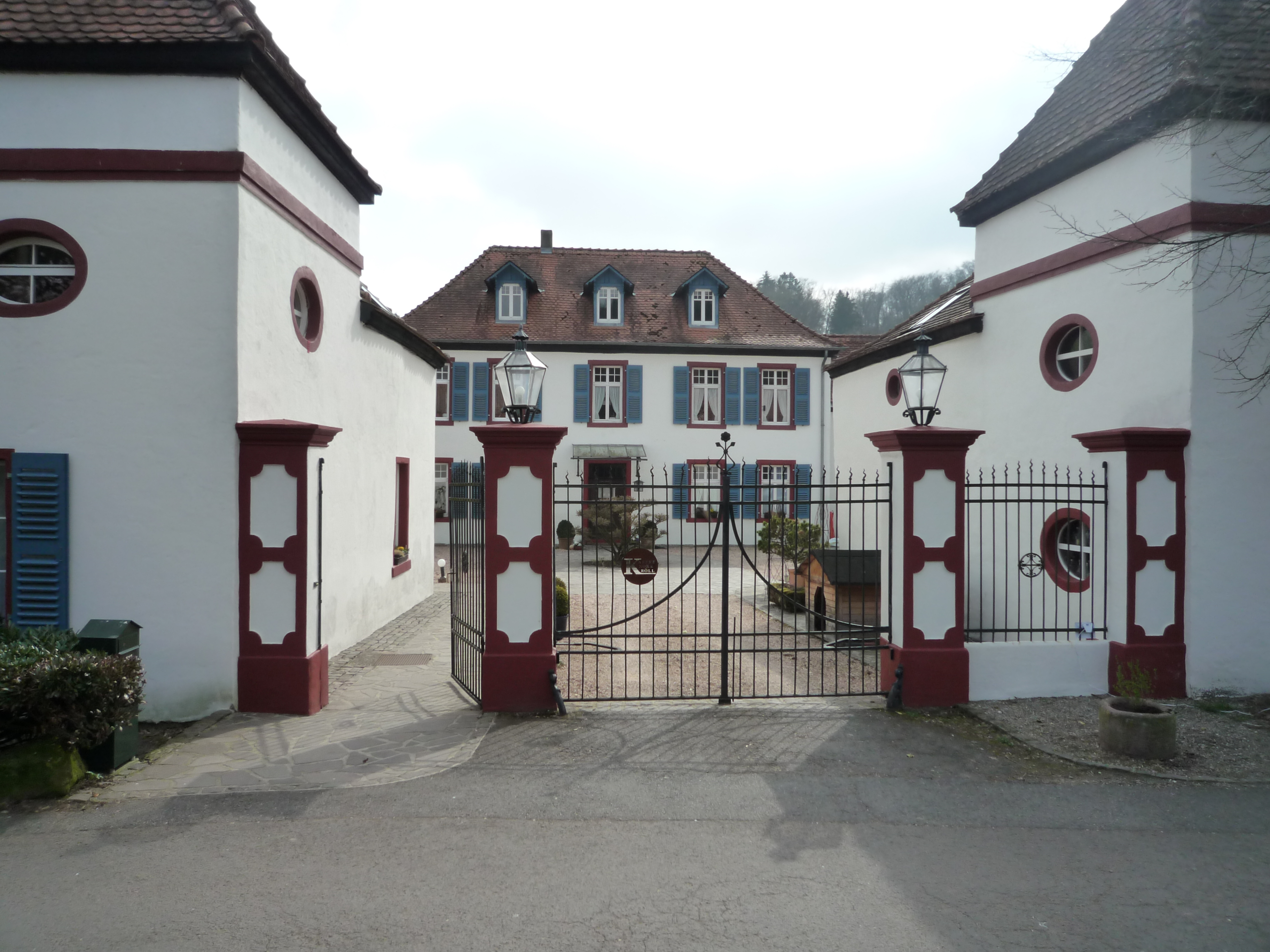 Annahof, Niederwürzbach, Saarland, Deutschland